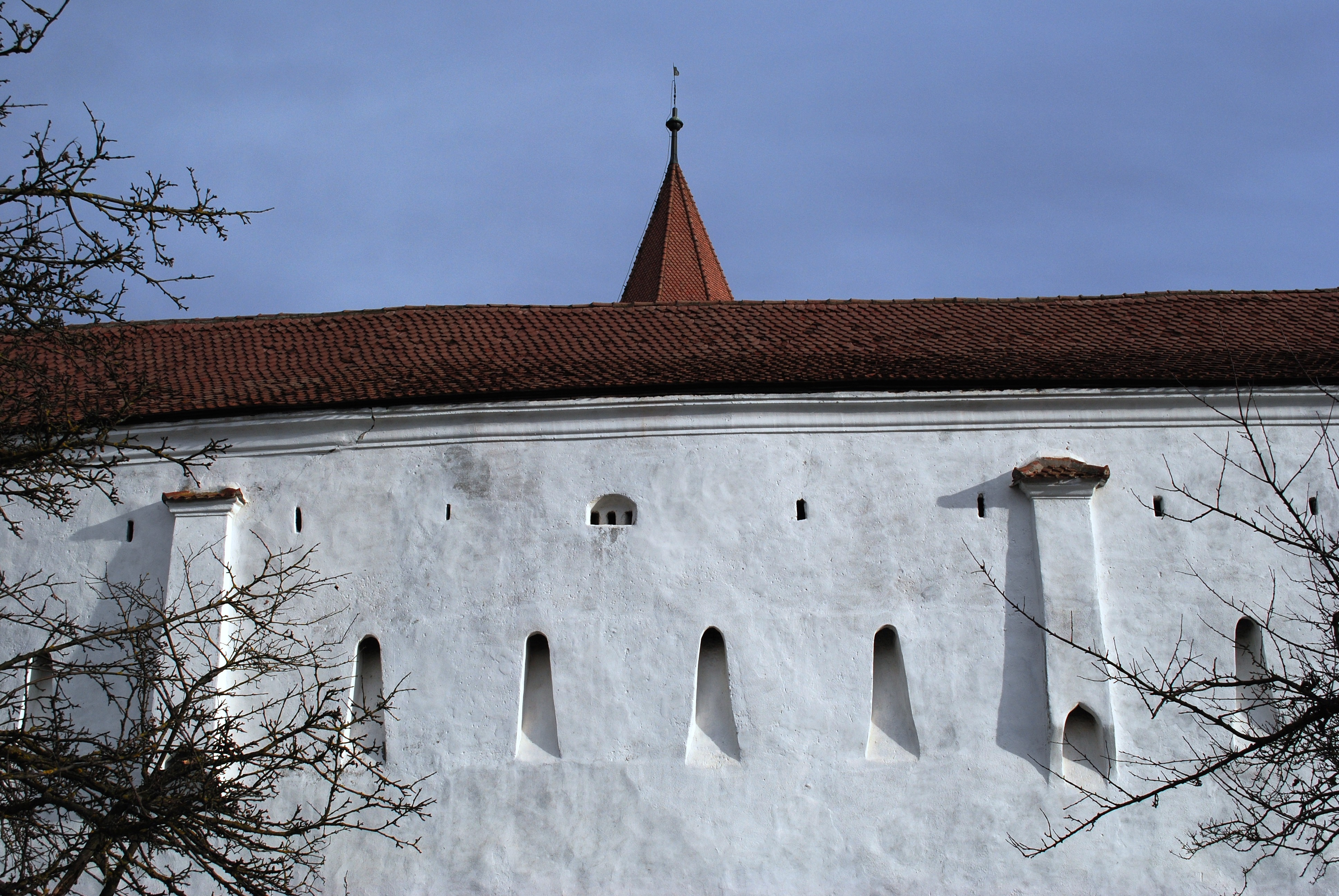 Incintă exterioară, sec. XVI 03